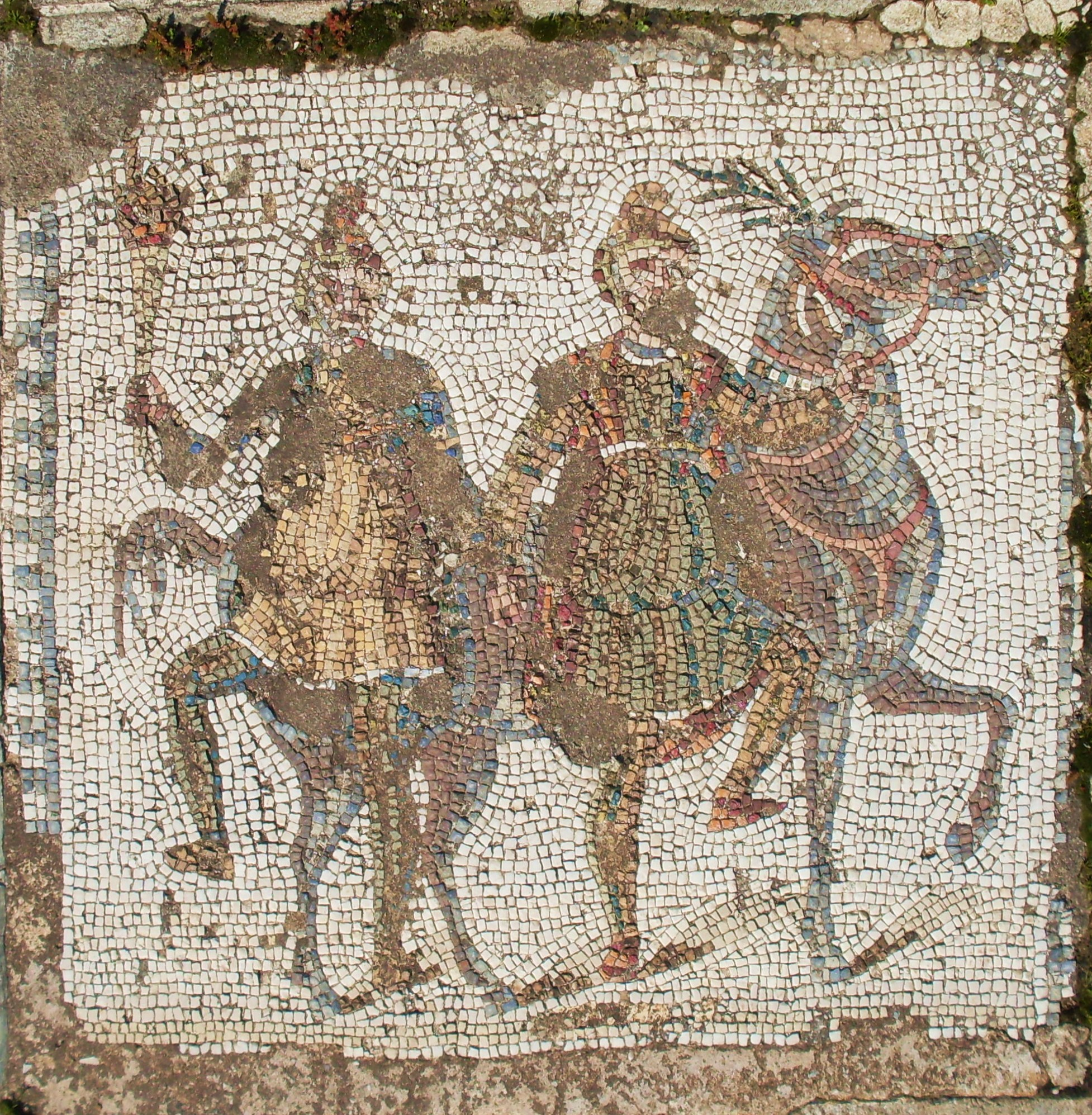 Panneau de la mosaïque des cheveaux